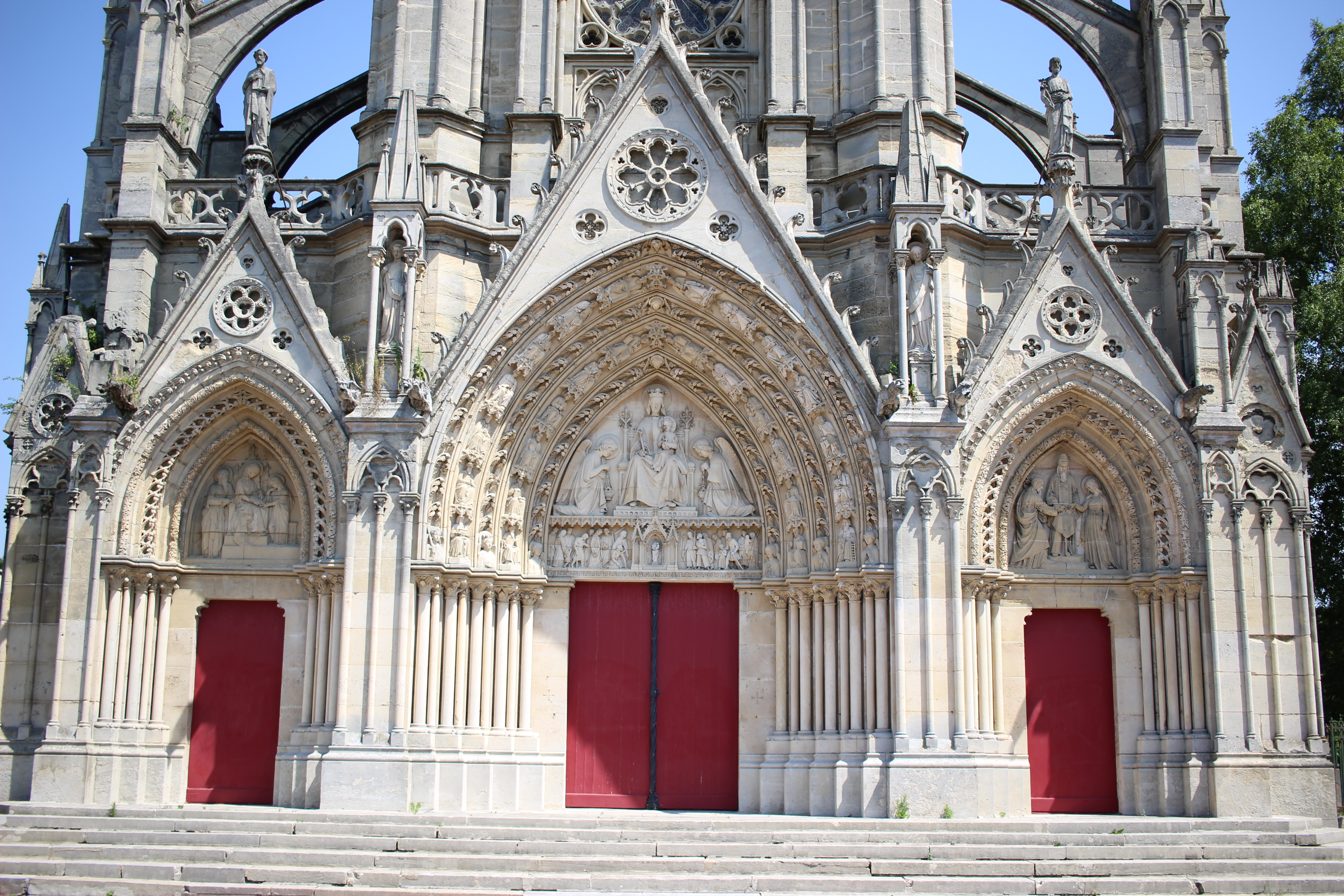 Portails de la façade occidentale de la basilique.